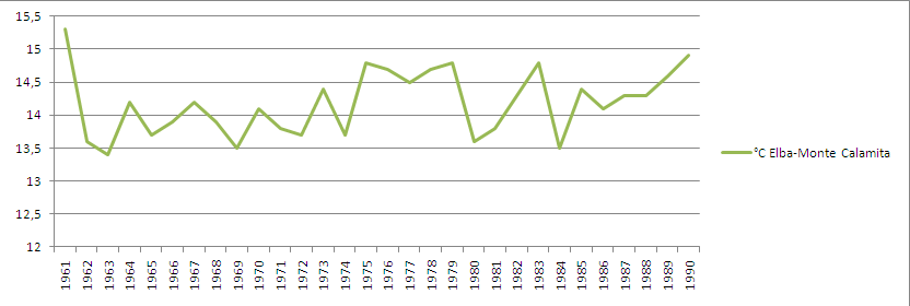 Stazione meteorologica di Elba-Monte Calamita: andamento della temperatura media annua dal 1961 al 1990.